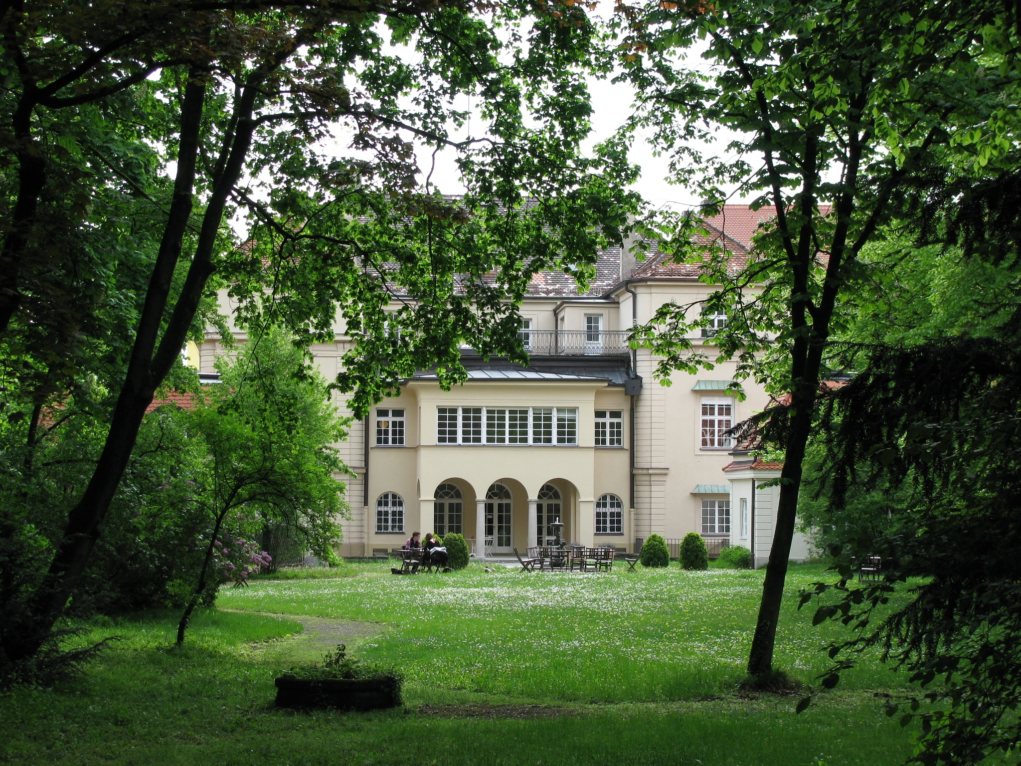 Ehemaliges Palais Seyssel d’Aix in München, Blick in den Garten von der Staatsbibliothek aus